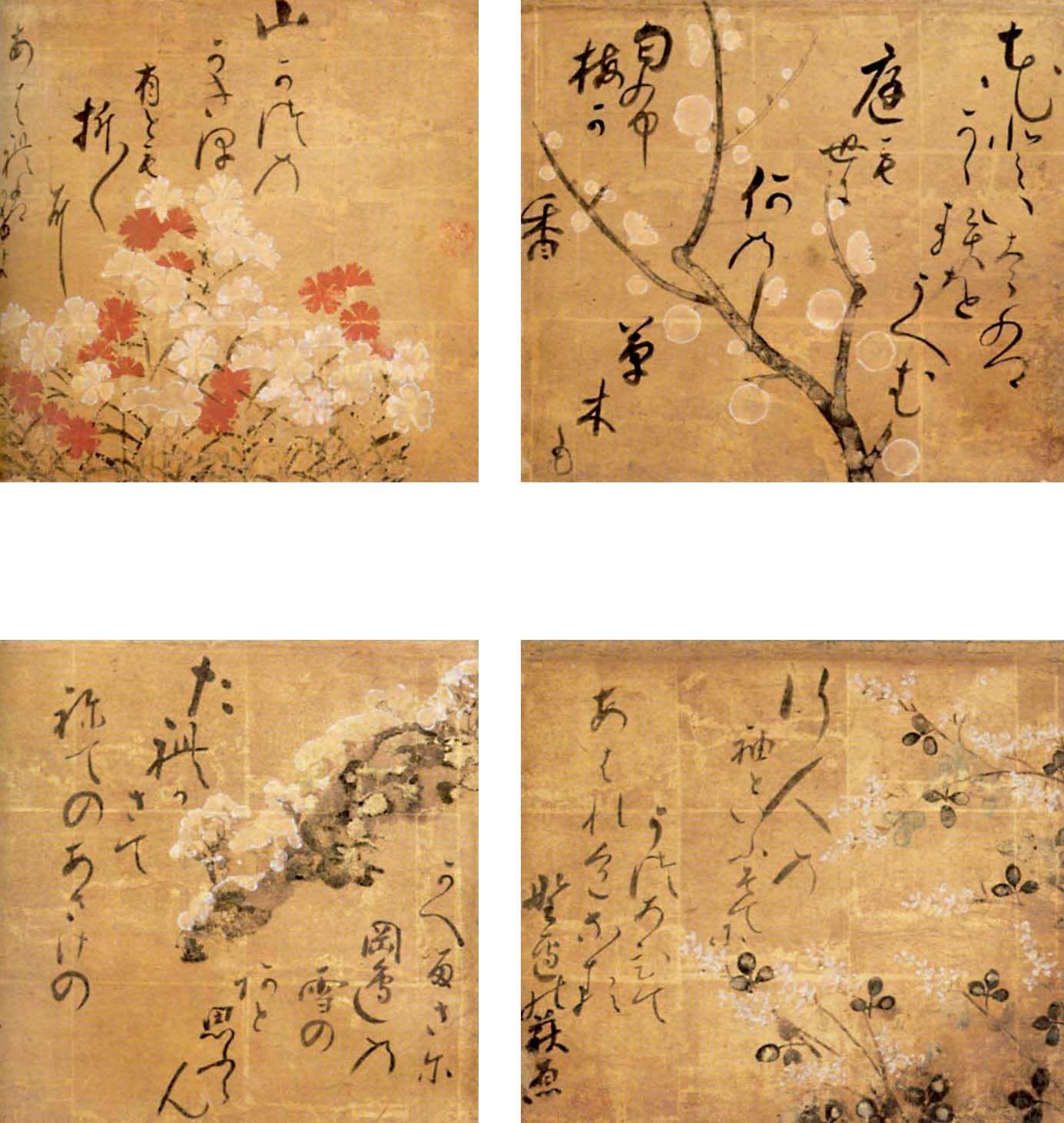 Ogata Kenzan: Pflaumen, Nelke, Klee und Schnee